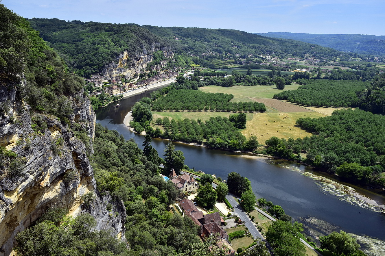 Dordogne im Hintergrund La Roque-Gageac